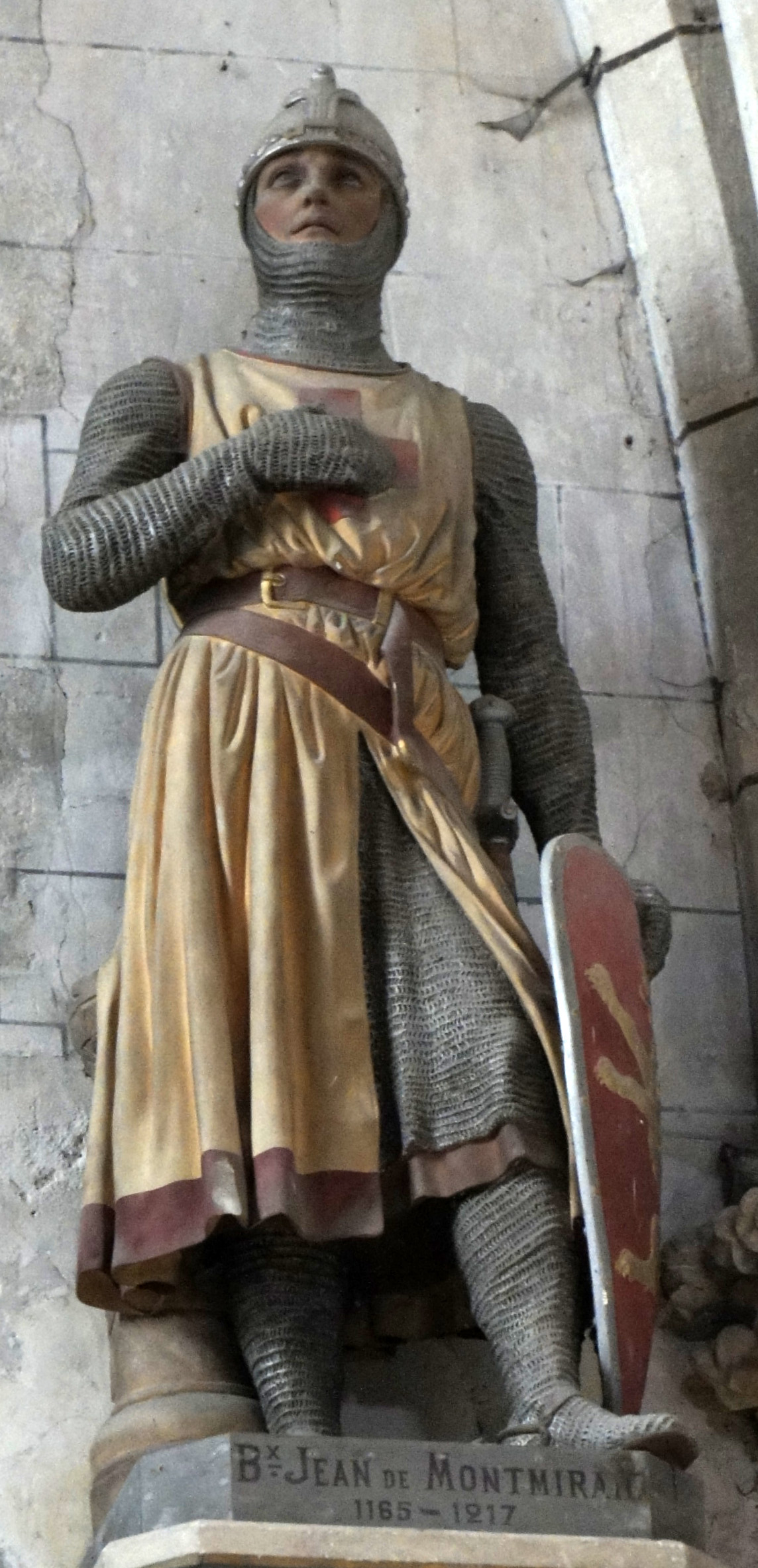 dans l'Église de Montmirail (Marne).